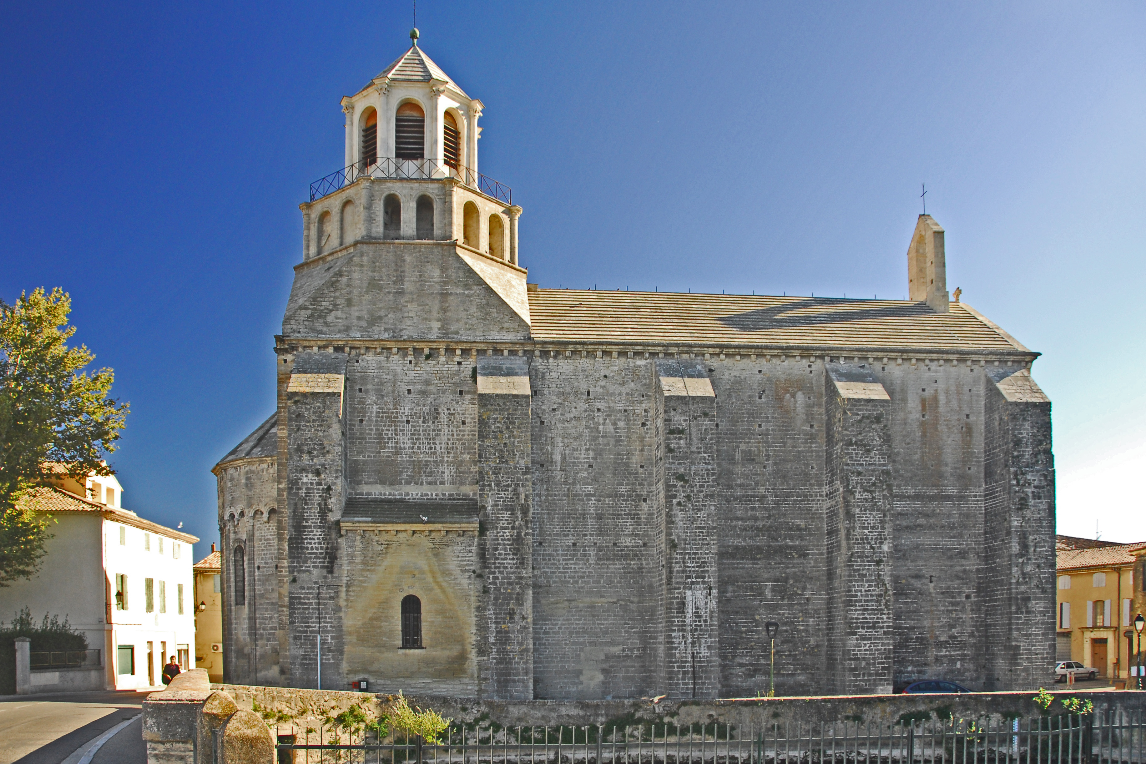 N-D-du-Lac du Le Thor, Nordseite